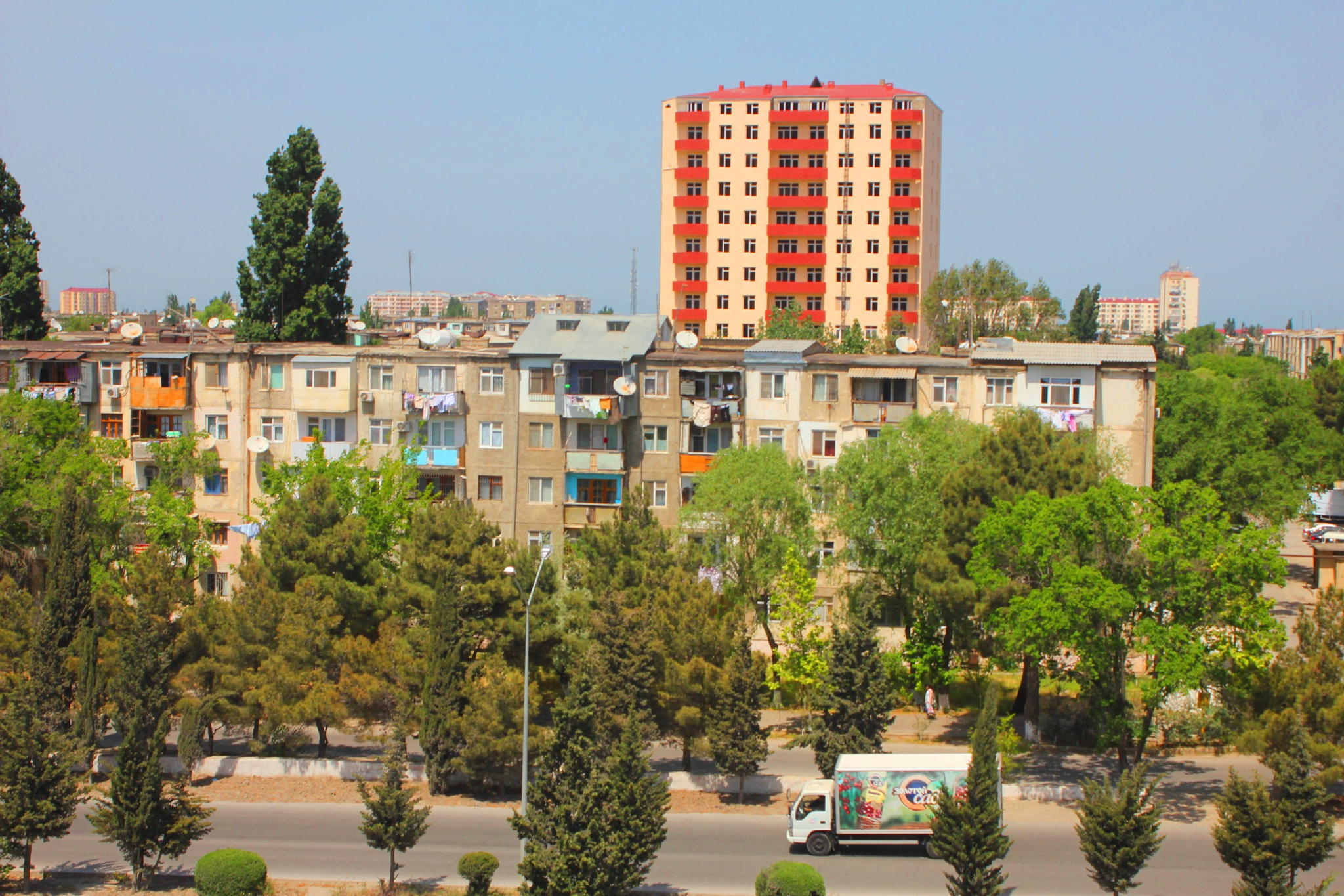 Sumqayıt şəhəri 8-ci mikrorayon